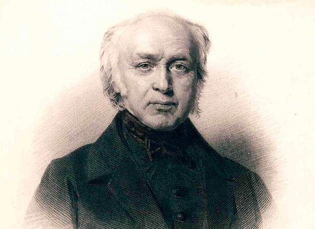 Clemens Maria Franciscus von Bönninghausen